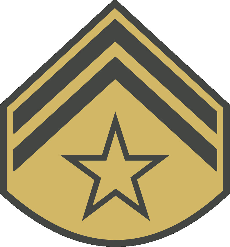 Insígnia do 8º Uniforme de Aluno do Curso de Formação de Sargentos de Carreira